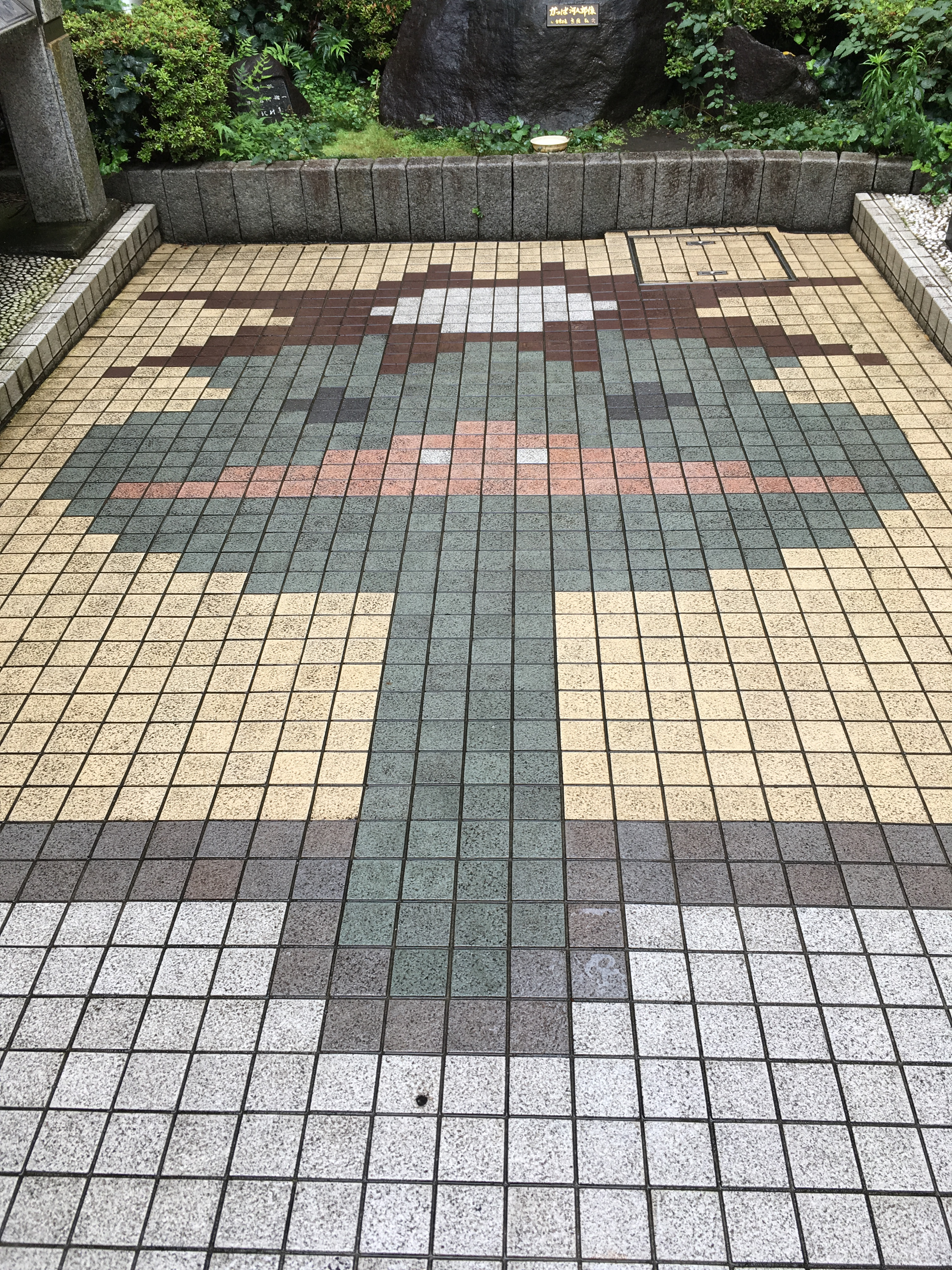 Mosaïque représentant un kappa au pied de la statue dorée de Kappabashi.